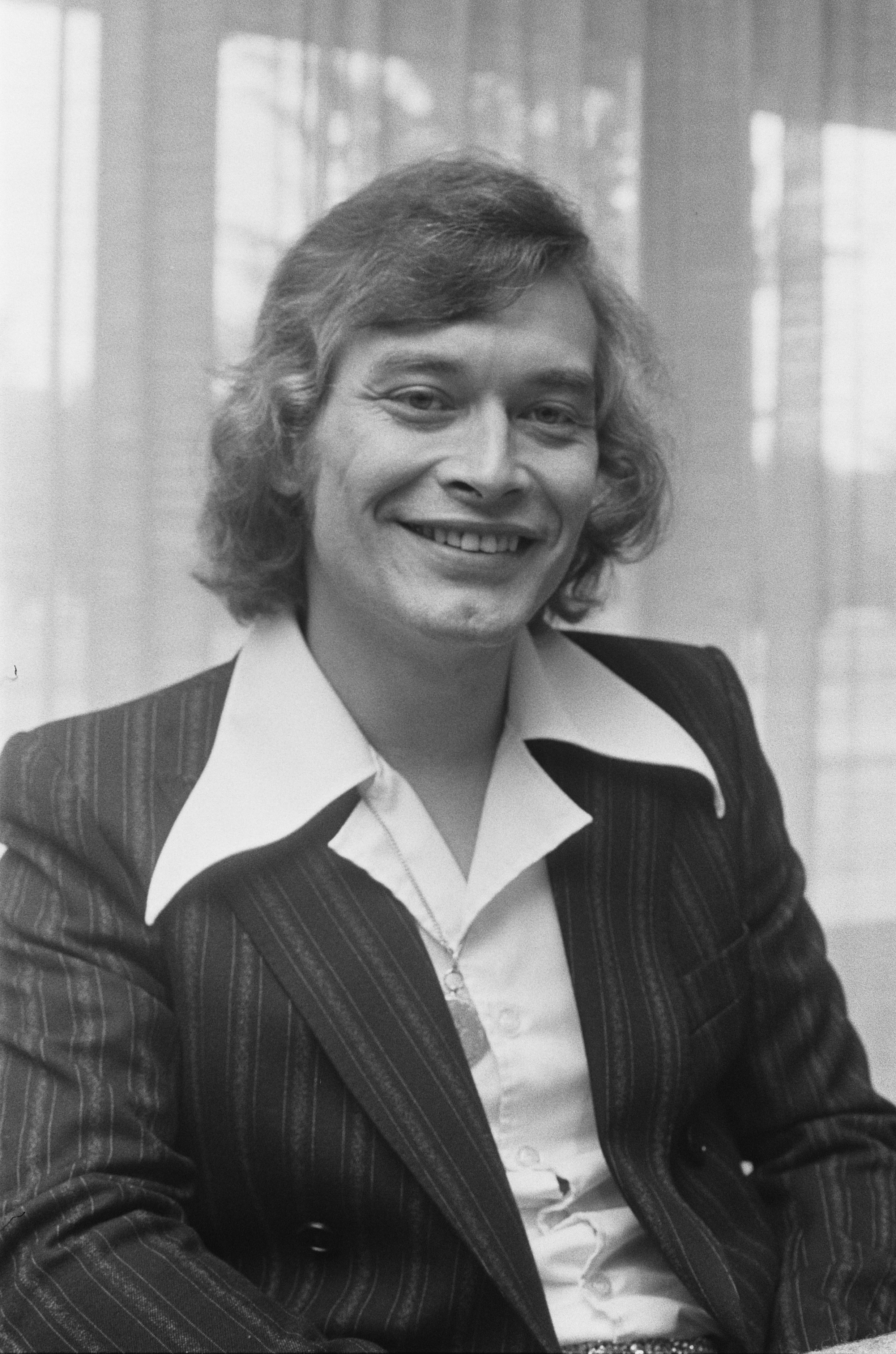 Collectie / Archief : Fotocollectie Anefo Reportage / Serie : [ onbekend ] Beschrijving : Aage M. (Meinesz), kop Datum : 8 oktober 1976 Persoonsnaam : Aage M. Fotograaf : Verhoeff, Bert / Anefo Auteursrechthebbende : Nationaal Archief Materiaalsoort : Negatief (zwart/wit) Nummer archiefinventaris : bekijk toegang 2.24.01.05 Bestanddeelnummer : 928-8203